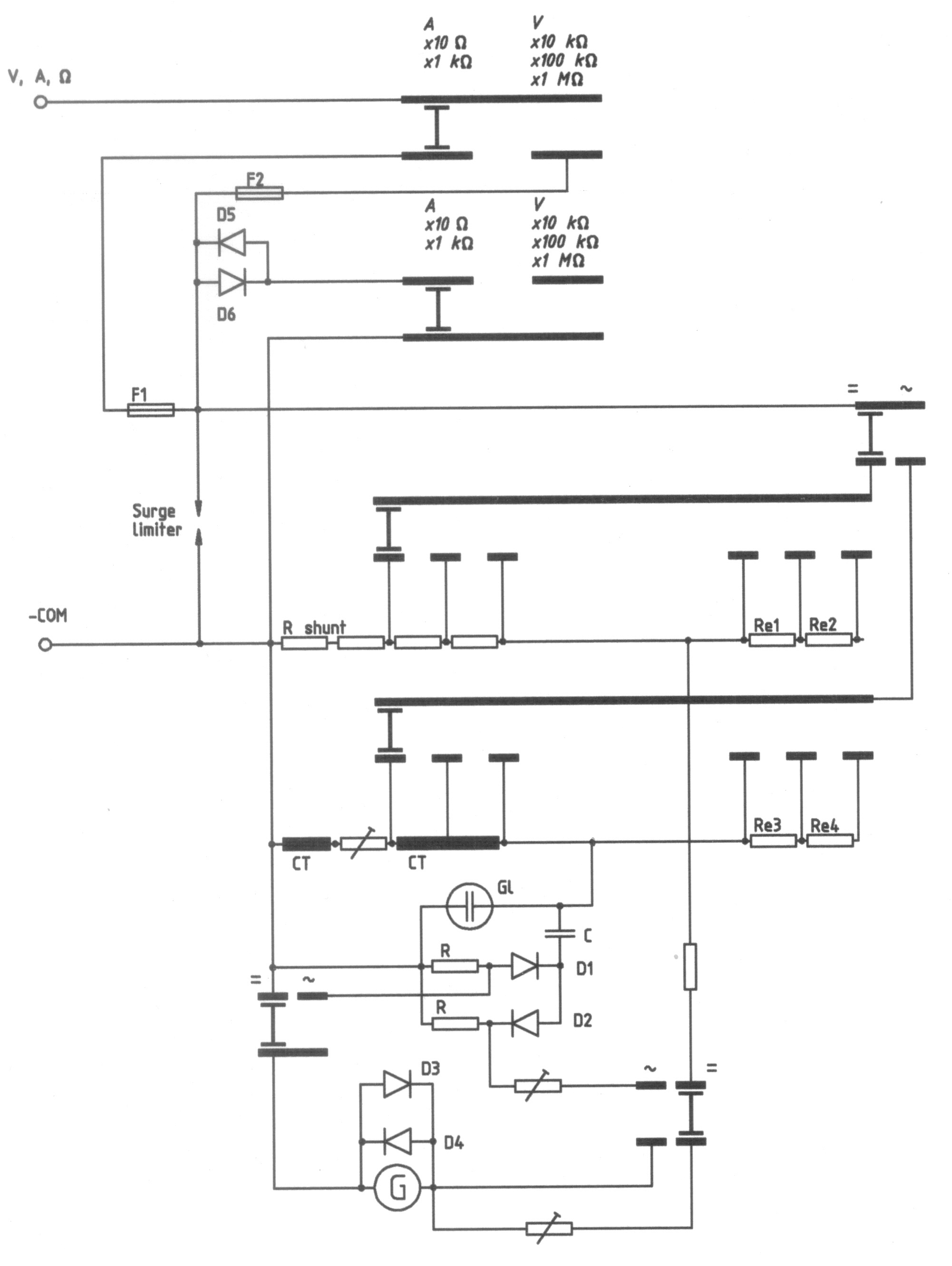 Analóg multiméter túlterhelés elleni védelmei.